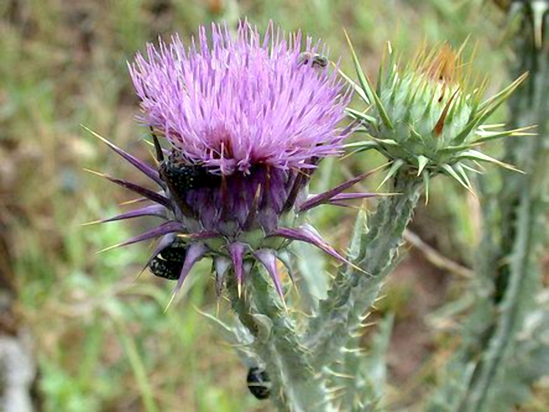 Onopordum macracanthum - Haouz, circa El Kelaa (Marruecos).